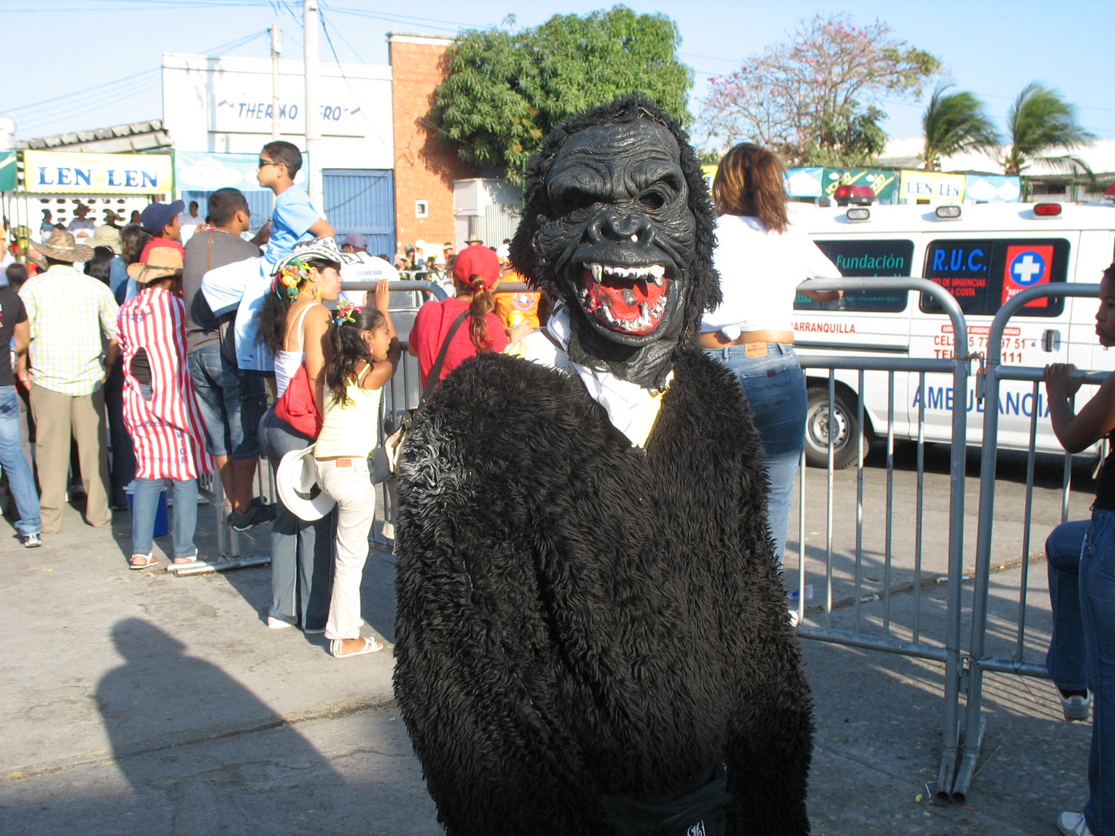 Disfraz de oso